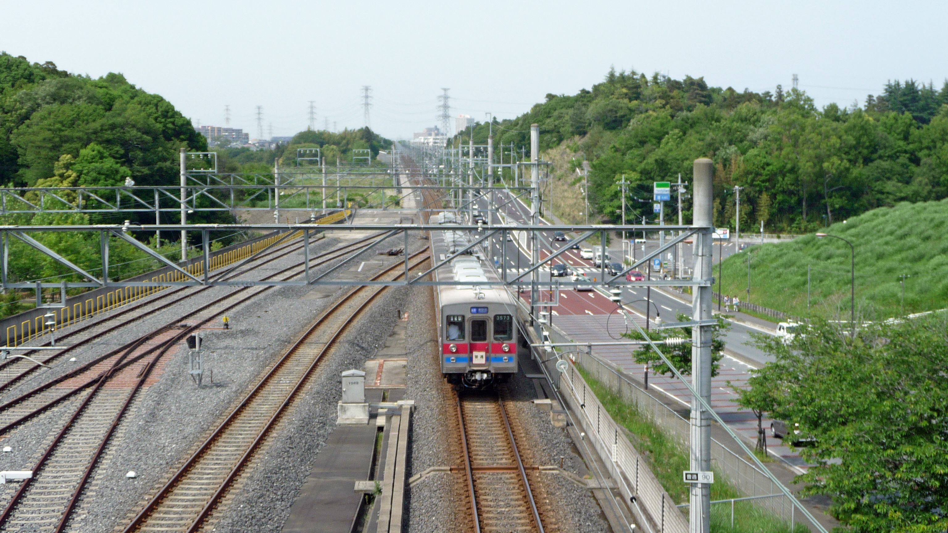 ちはら台駅を発車する京成千原線列車